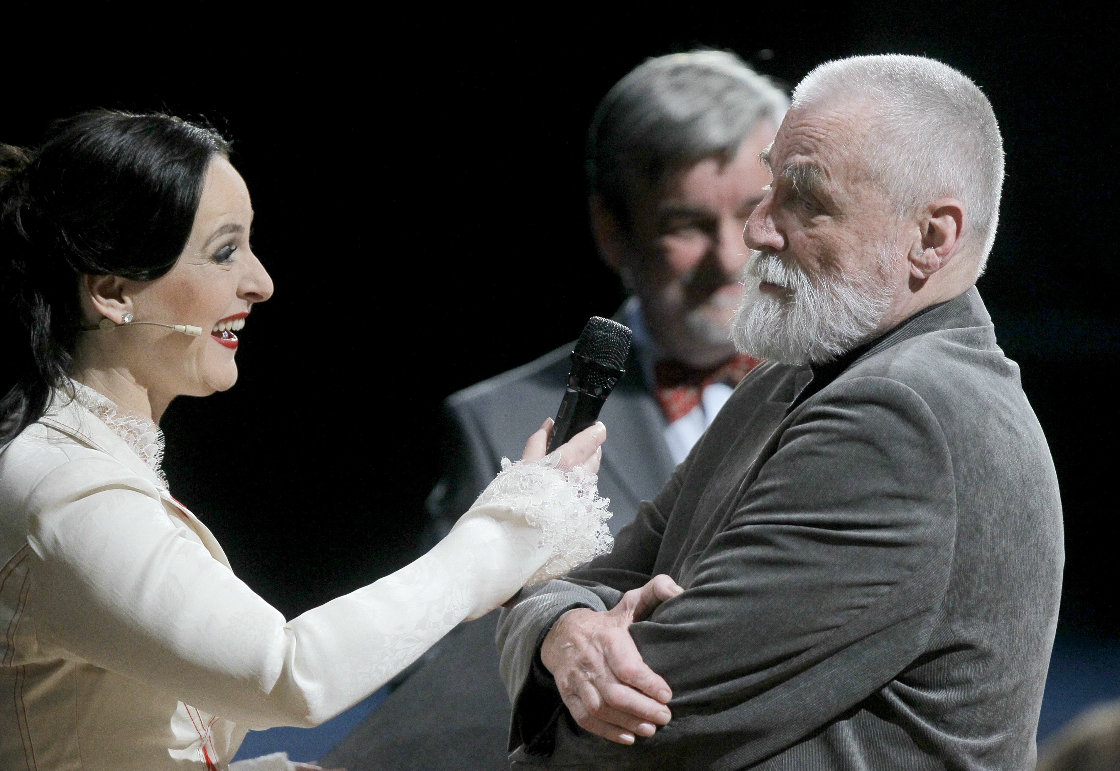 Državna proslava ob Prešernovem dnevu